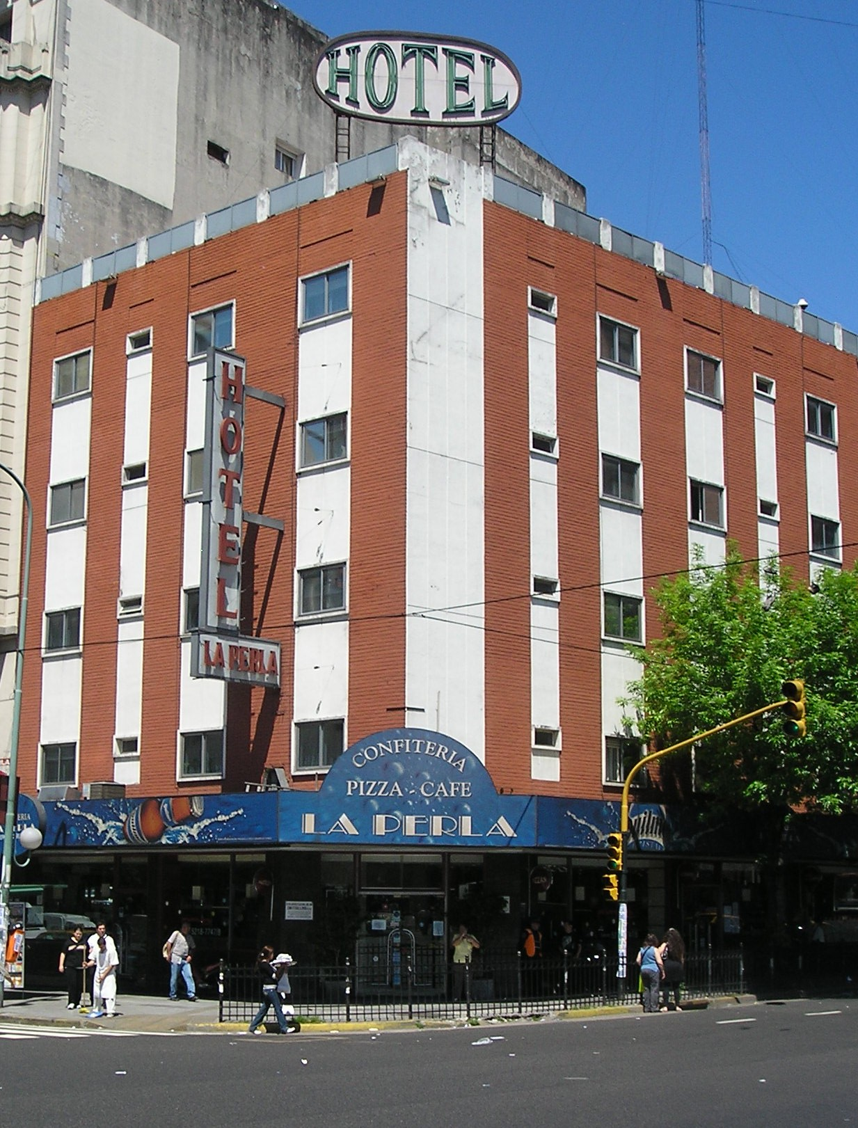 La Perla del Once. Esquina de las avenidas Rivadavia y Jujuy (barrio Once). Buenos Aires. Lugar donde se compuso La Balsa (Litto Nebbia y Tanguito).